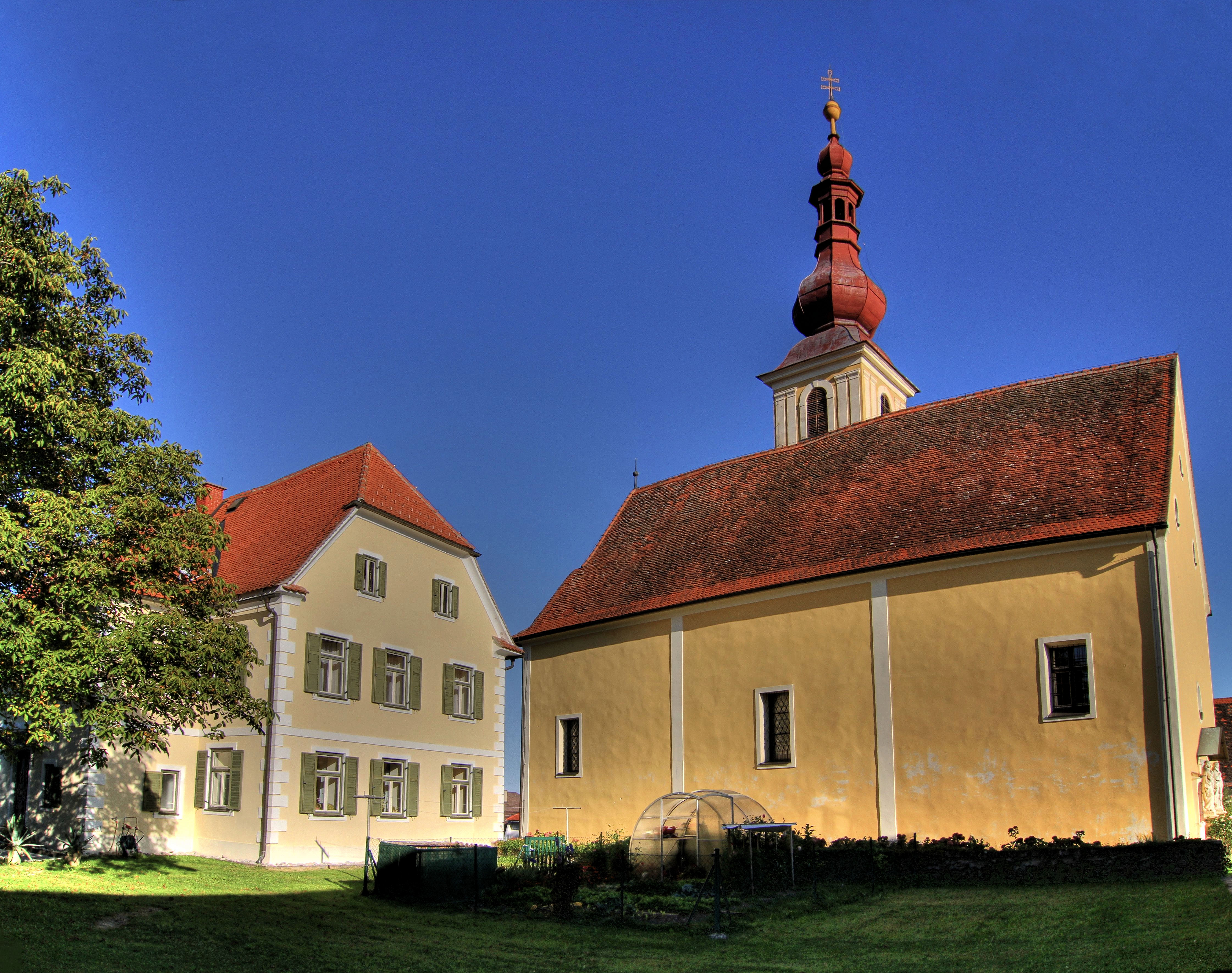 Kath. Pfarrkirche hl. Stephan und Pfarrhof von Norde